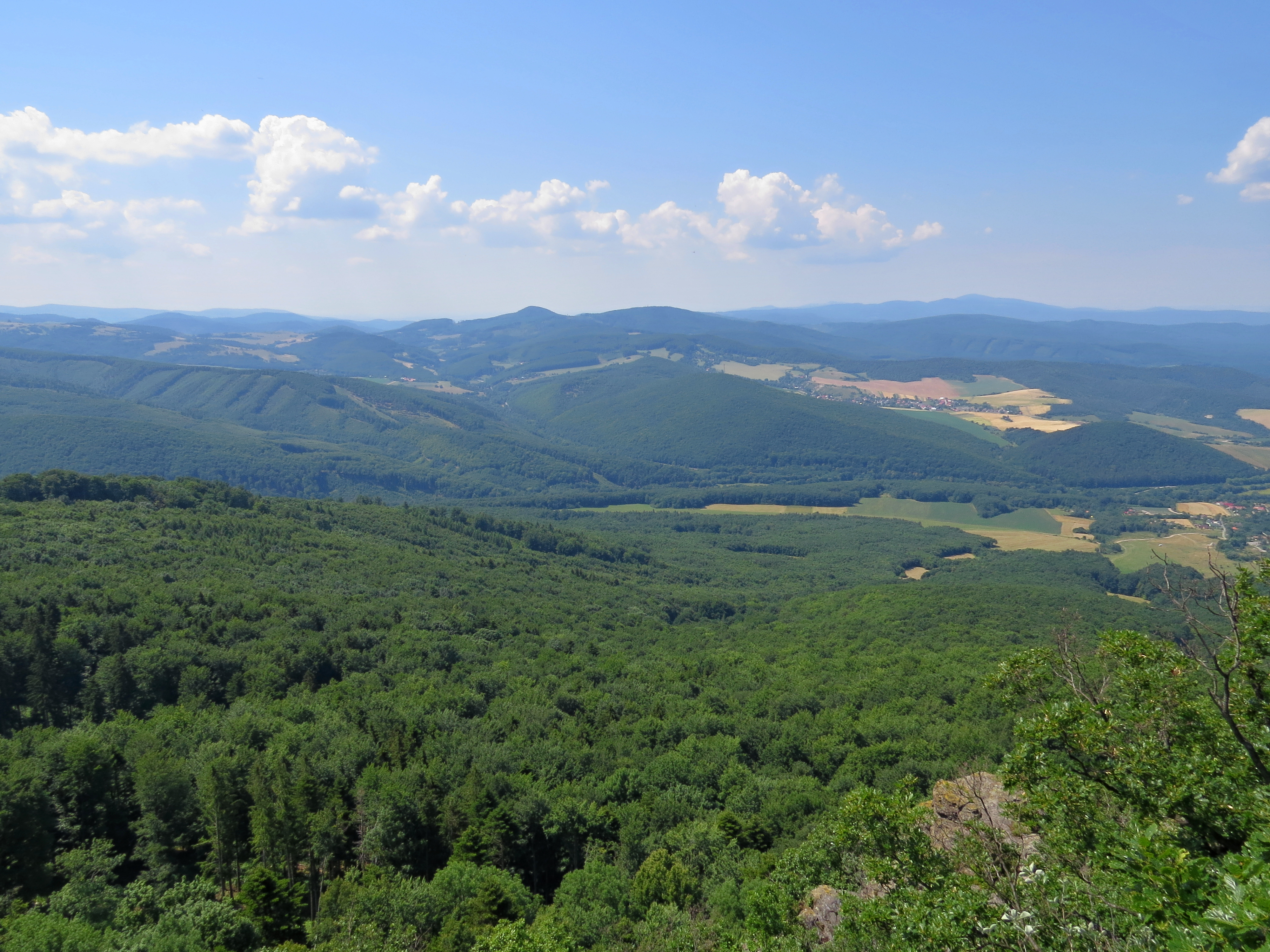 Přírodní rezervace Buchlov - pohled z vrchu Žarnov směrem na jih